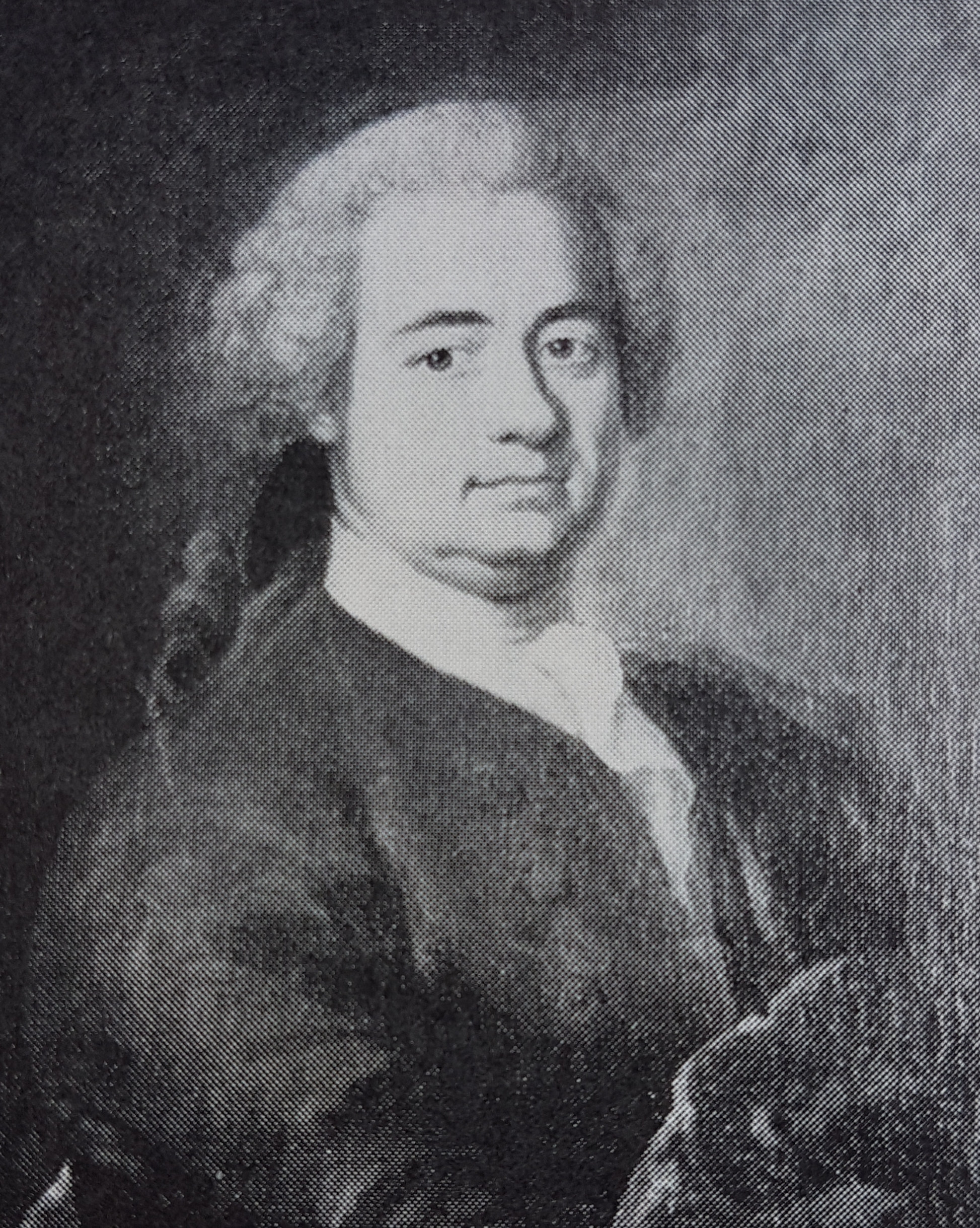 Johan Stålbom självporträtt, avfotograferad porträttbild från Allhems Svenskt konstnärslexikon.